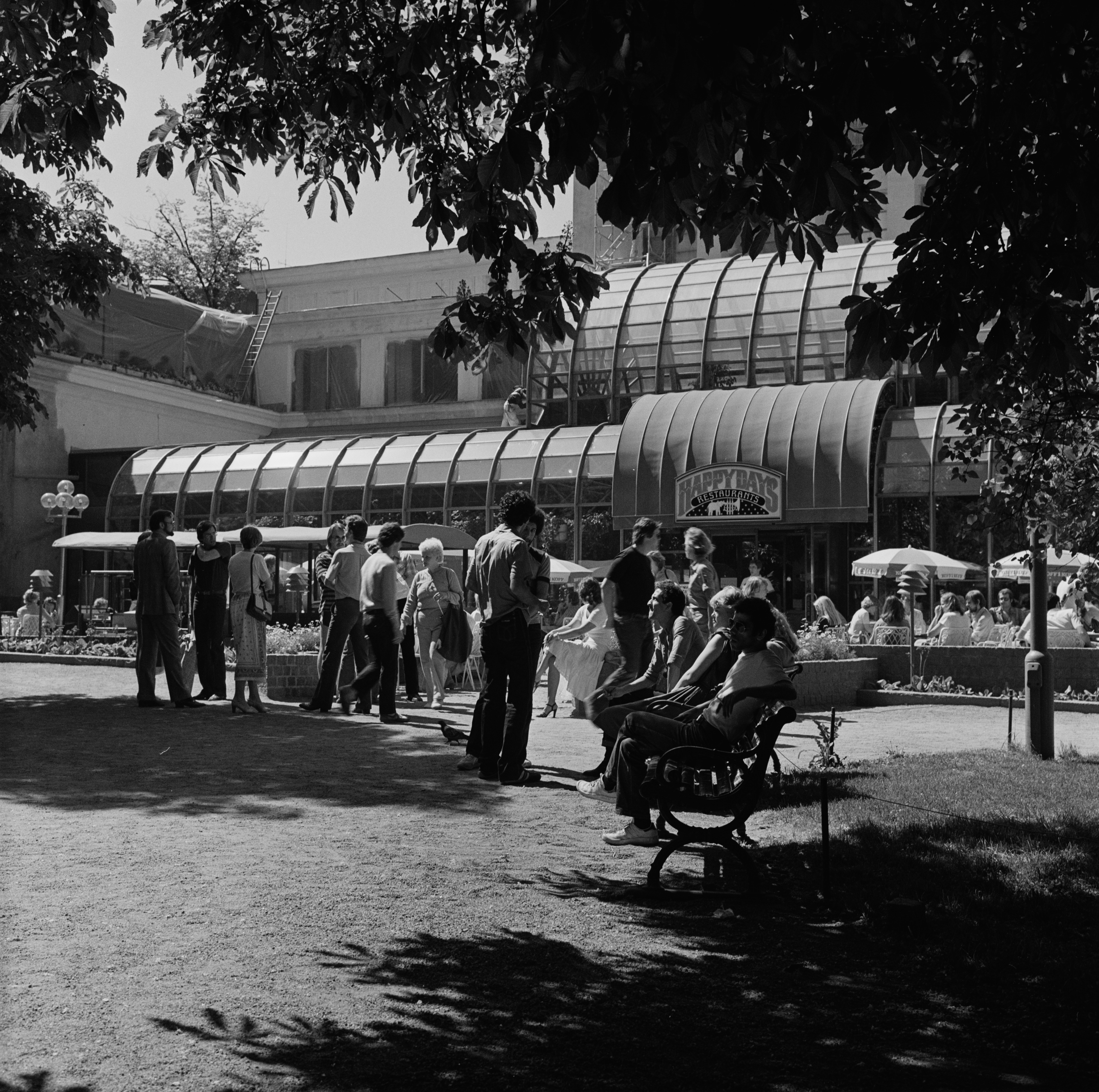 Oleskelua ravintola Happy Daysin edustalla Teatteriesplanadilla.